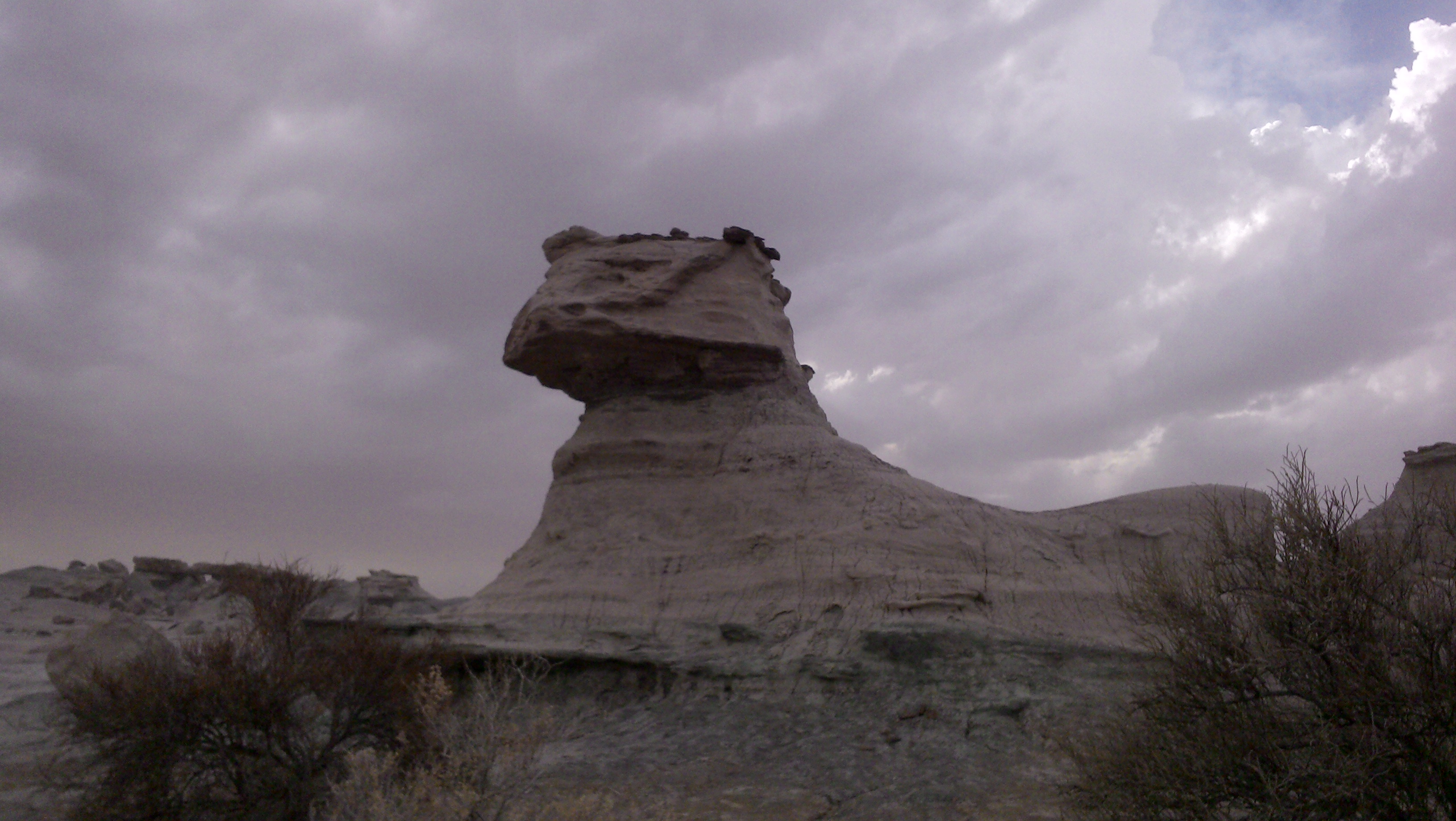 Formación rocosa que a causa de la erosión eólica, ha adoptado la forma de un felino cuasi esfinge. Se encuentra a metros de la entrada del Parque Provincial Ischigualasto - Valle de la Luna